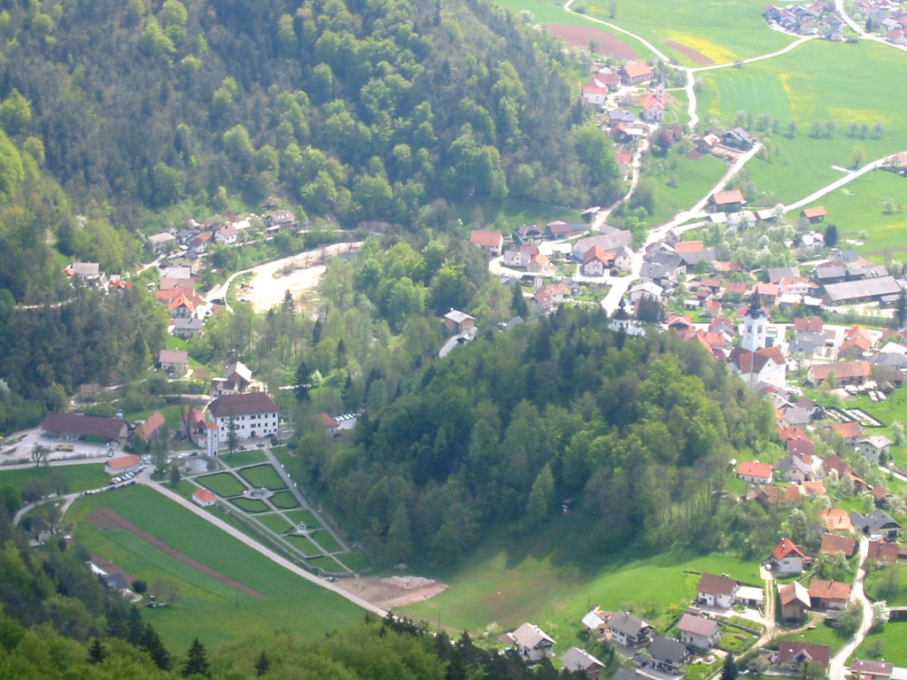 Polhov Gradec, town in Slovenia photo:Ziga 12:27, 12 April 2007 (UTC)